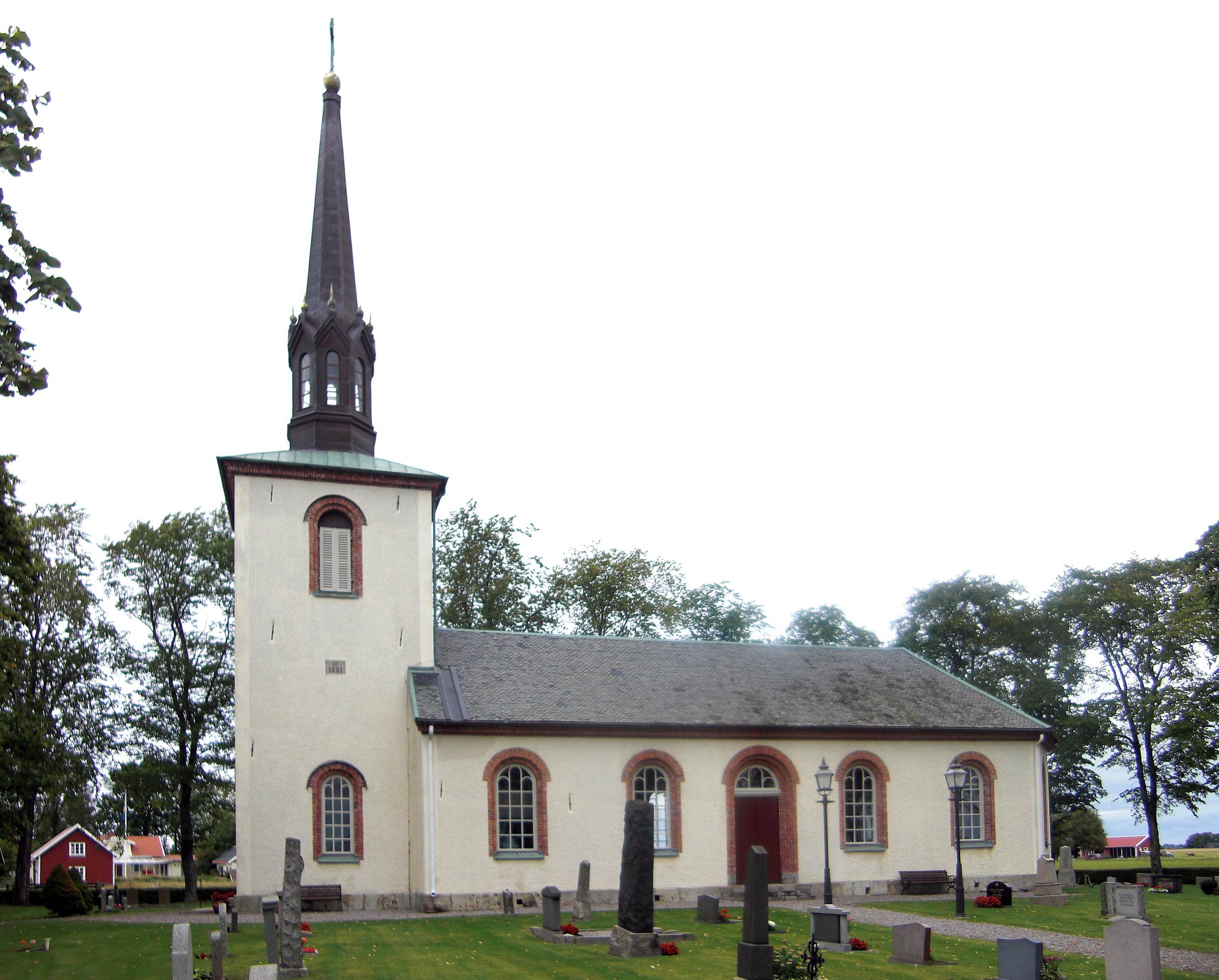 Sals kyrka i Åse härad, Grästorps kommun, Skara stift, Västergötland, Västra Götalands län, Sverige.